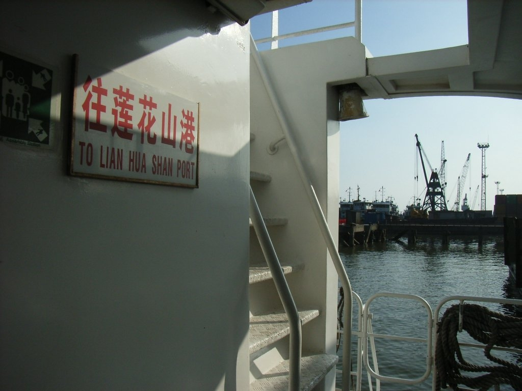 佛山祖廟建築群位於祖廟路二十一號佛山市博物館內，由祖廟、孔廟、碑廊、陳列館和園林組成，與黃飛鴻紀念館相通,占地 18600平方米，在1985年8月27日立之為全國重點文物保護單位